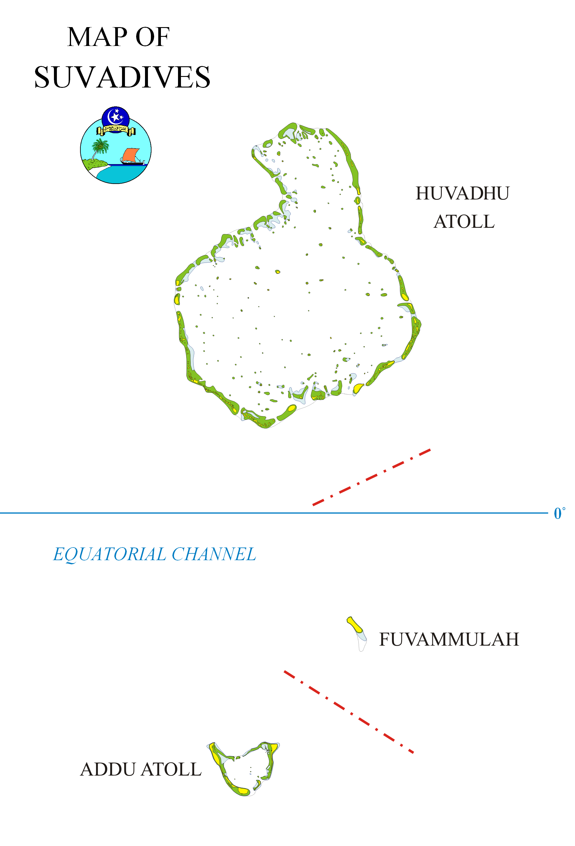 Map